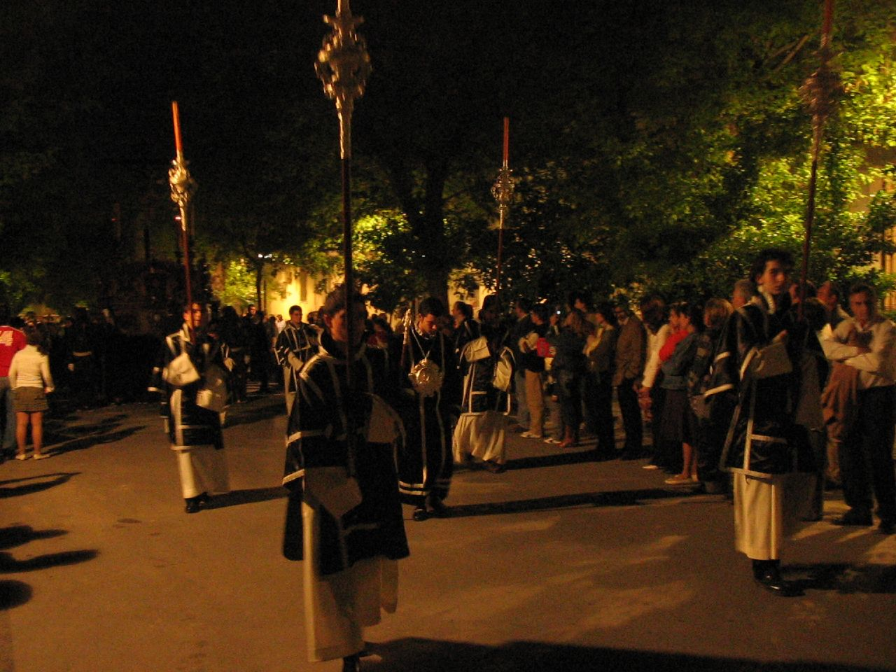 Servicio de paso del Cristo de la Humildad de la Hermandad del Silencio de Jaén.